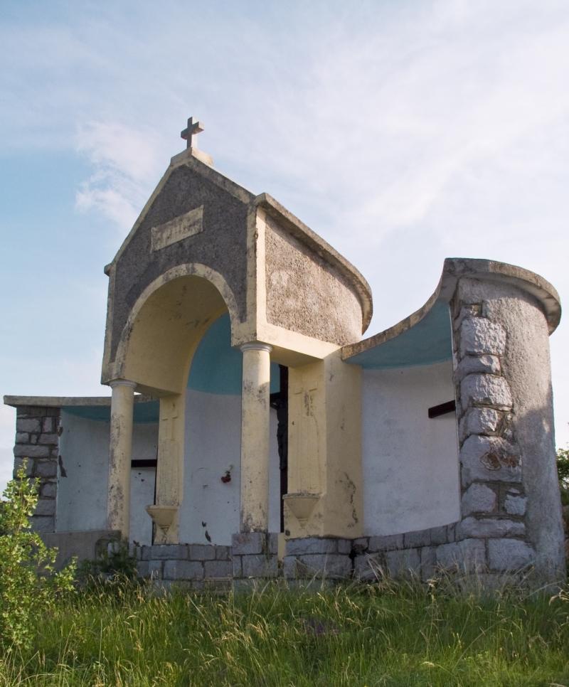 Kalvarija u Križišću